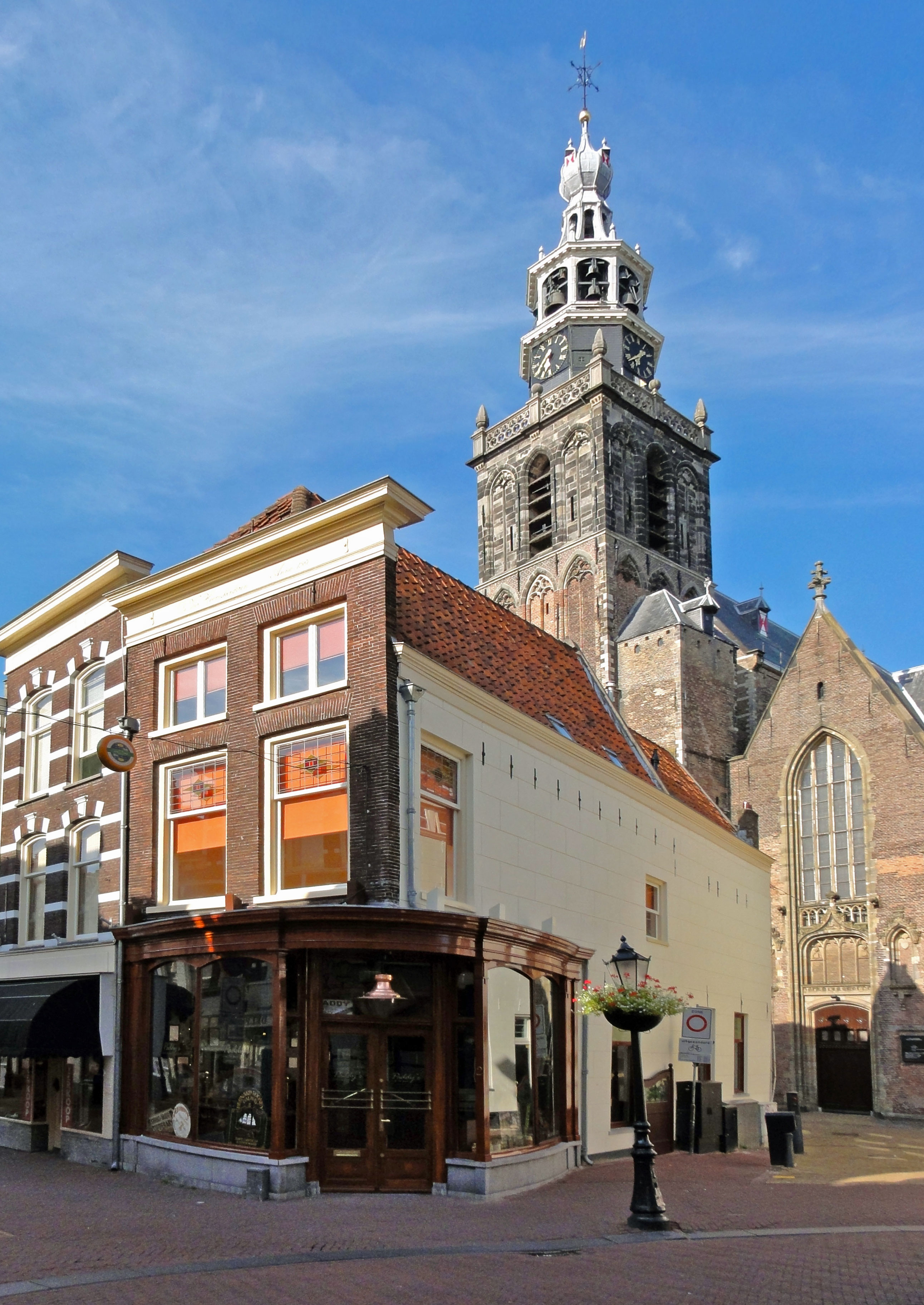 Wijdstraat 2 (hoek Torenstraat) Gouda, rijksmonument